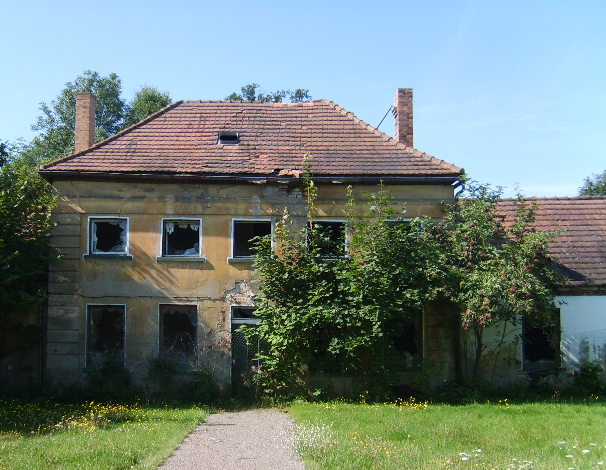 Gebäude im Schlosspark Lauchhammer-West